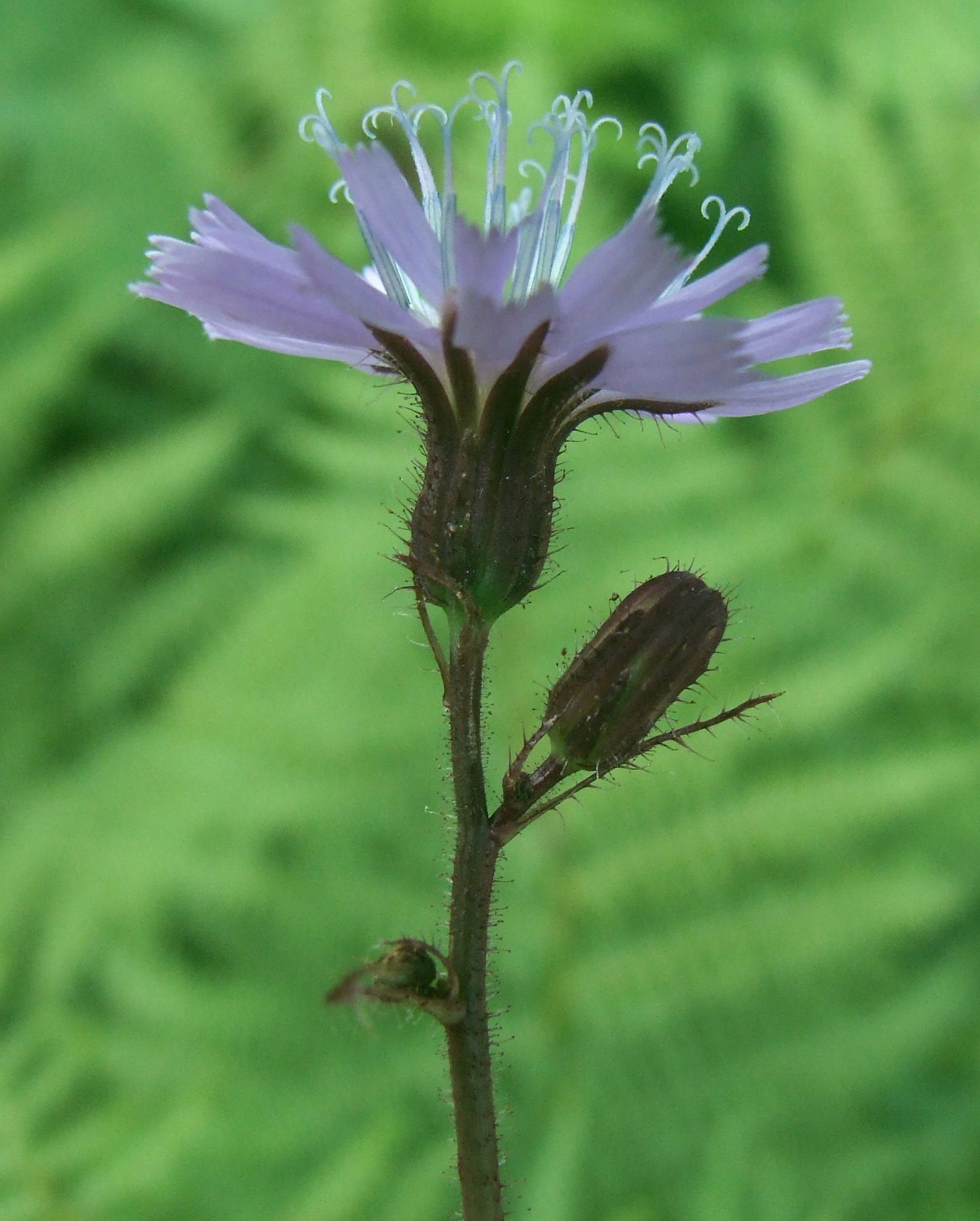 Cicerbita alpina (pl. modrzyk górski)